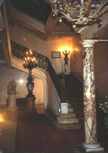 Pallavicini_Stiege